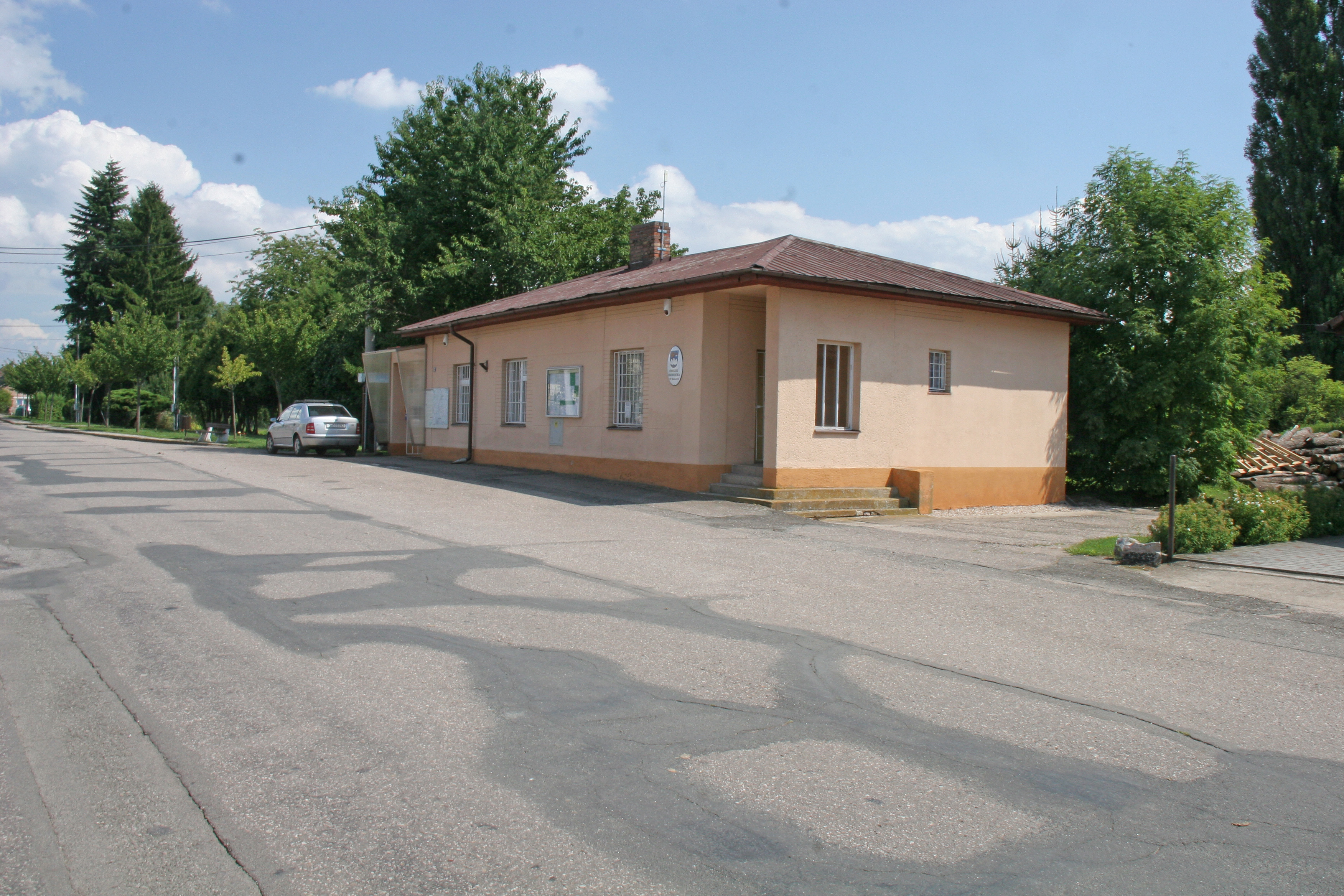 Skalice obecní úřad